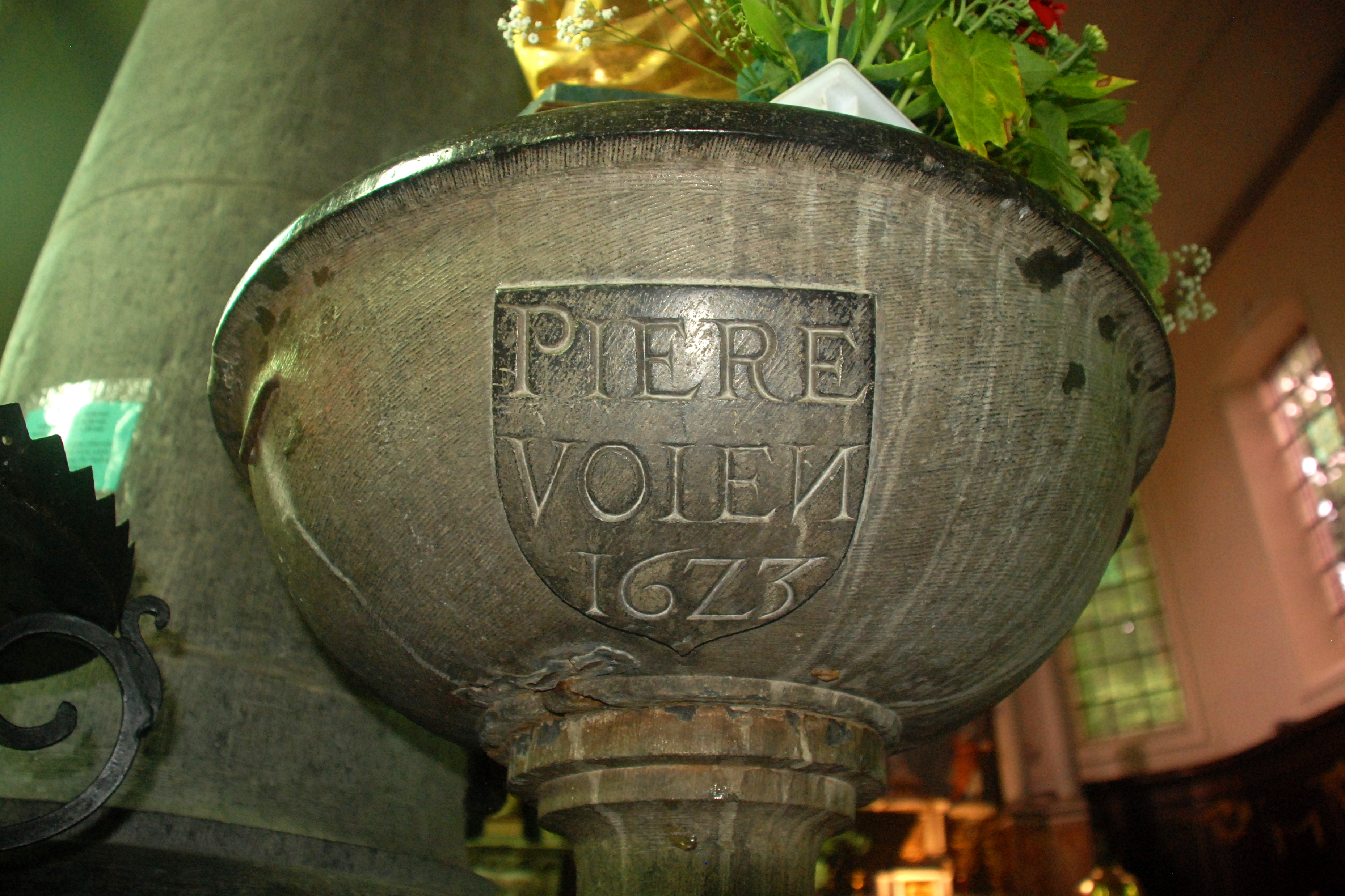 Belgique - Brabant wallon - Église de Court-Saint-Étienne